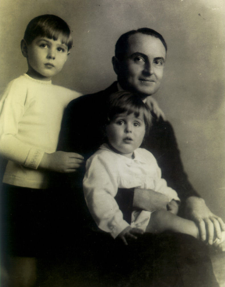 Српски (ћирилица): Кнез Павле Карађорђевић са синовима